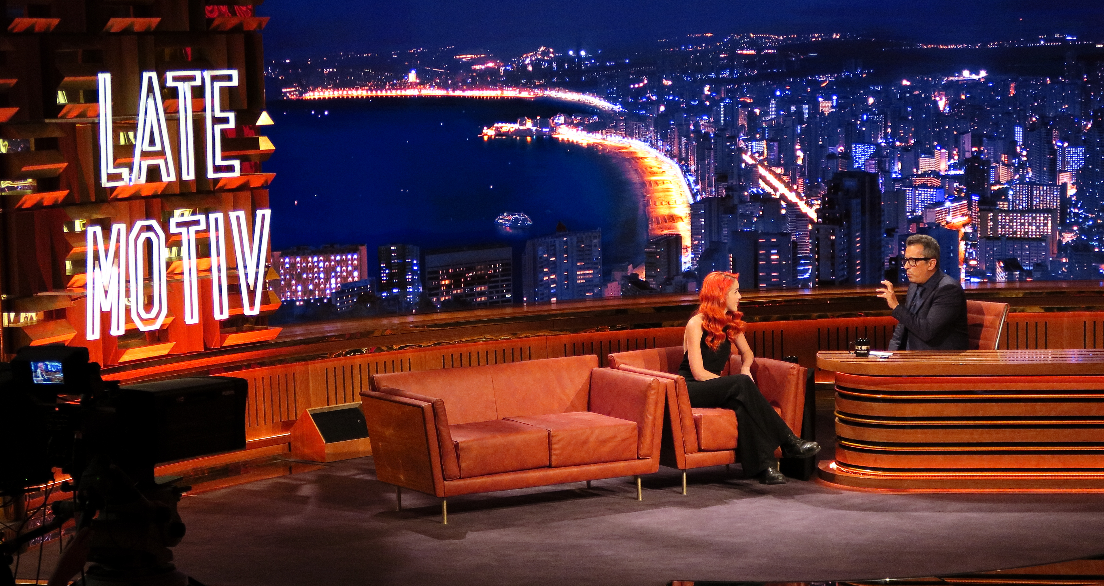 Late Motiv, Buenafuente y Amarna Miller, programa 125